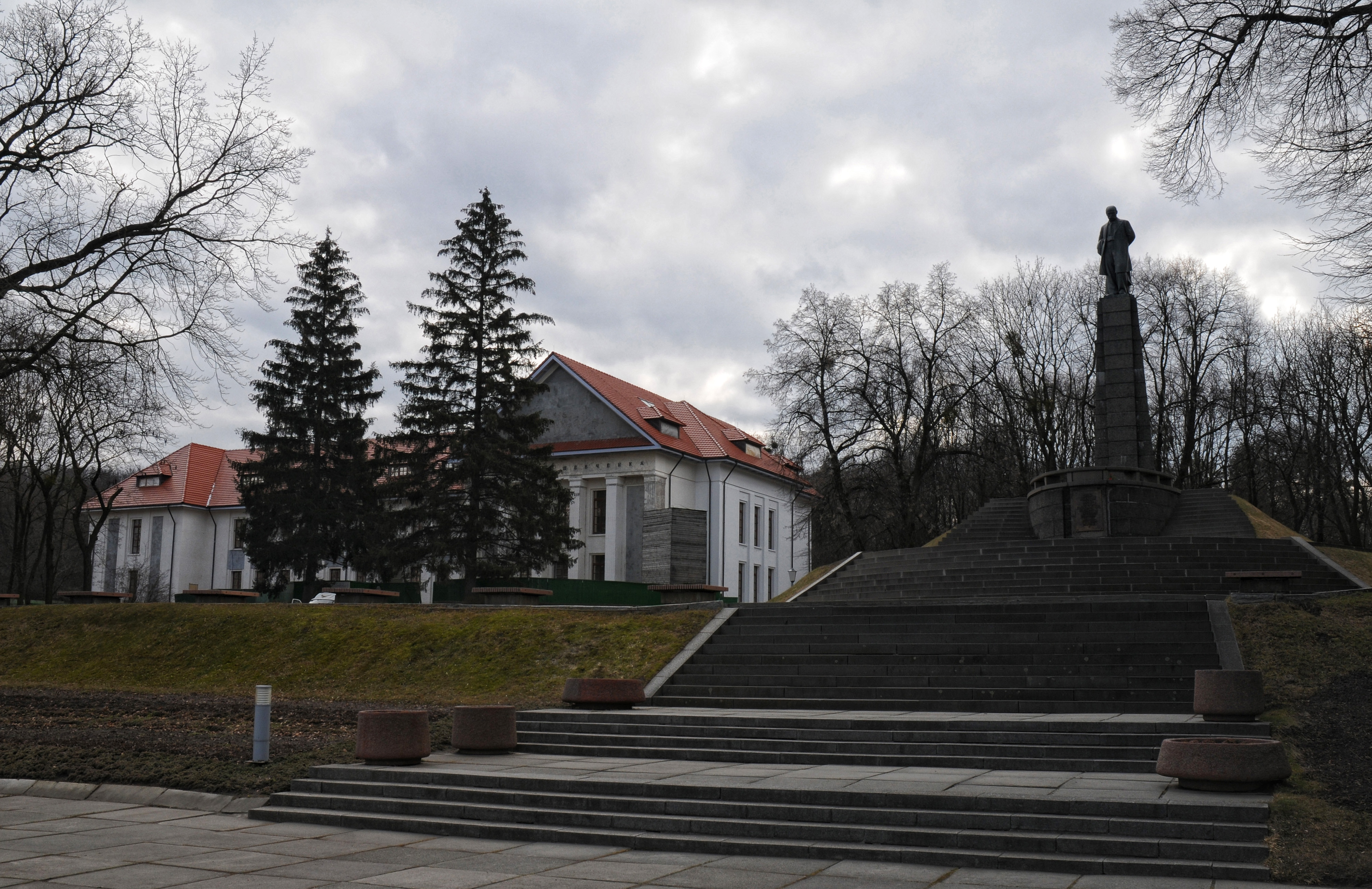 Канів, Чернеча гора, музей